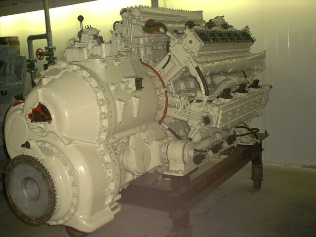 Wassergekühlter 42-Zylinder Diesel-Sternmotor russischer Fabrikation für den Marineeinsatz (JSC Zvezda M503) Category:Zvezda M503